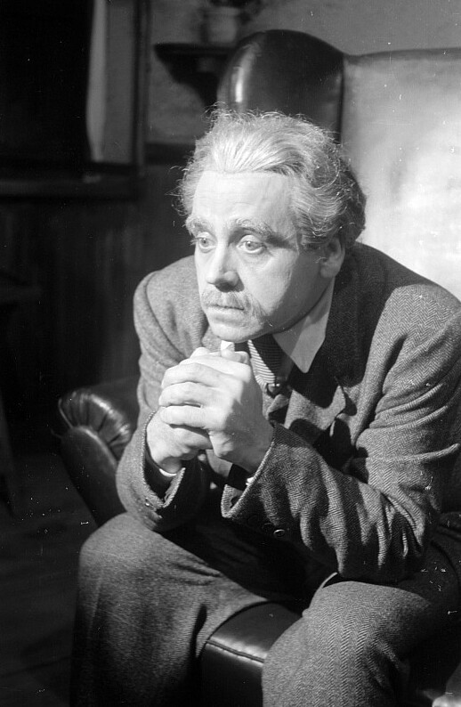 Original image description from the Deutsche FotothekSzenenbilder mit Ruth Schilling, Max Eckard und Walter Richter